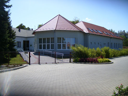 Pusztaszabolcsi városháza (Fejér megye)